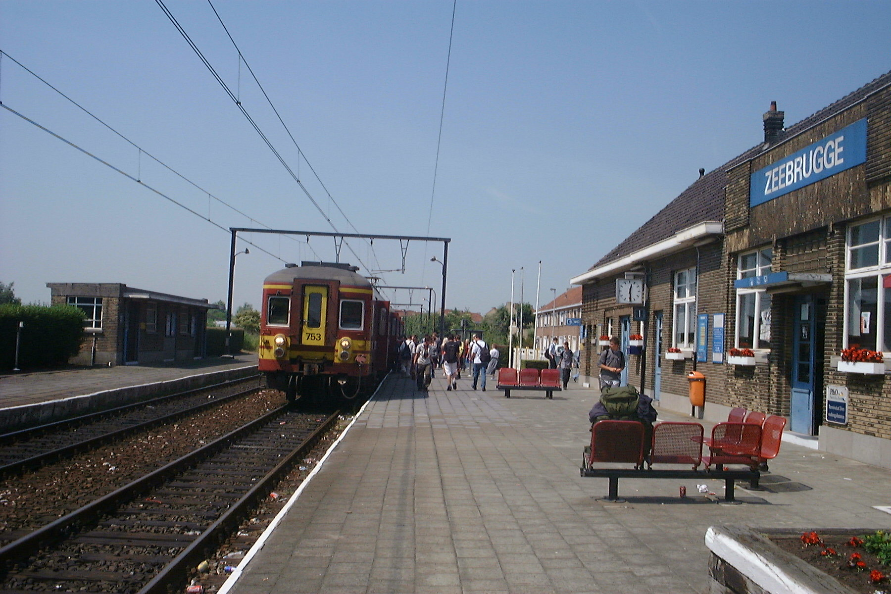 station Zeebrugge